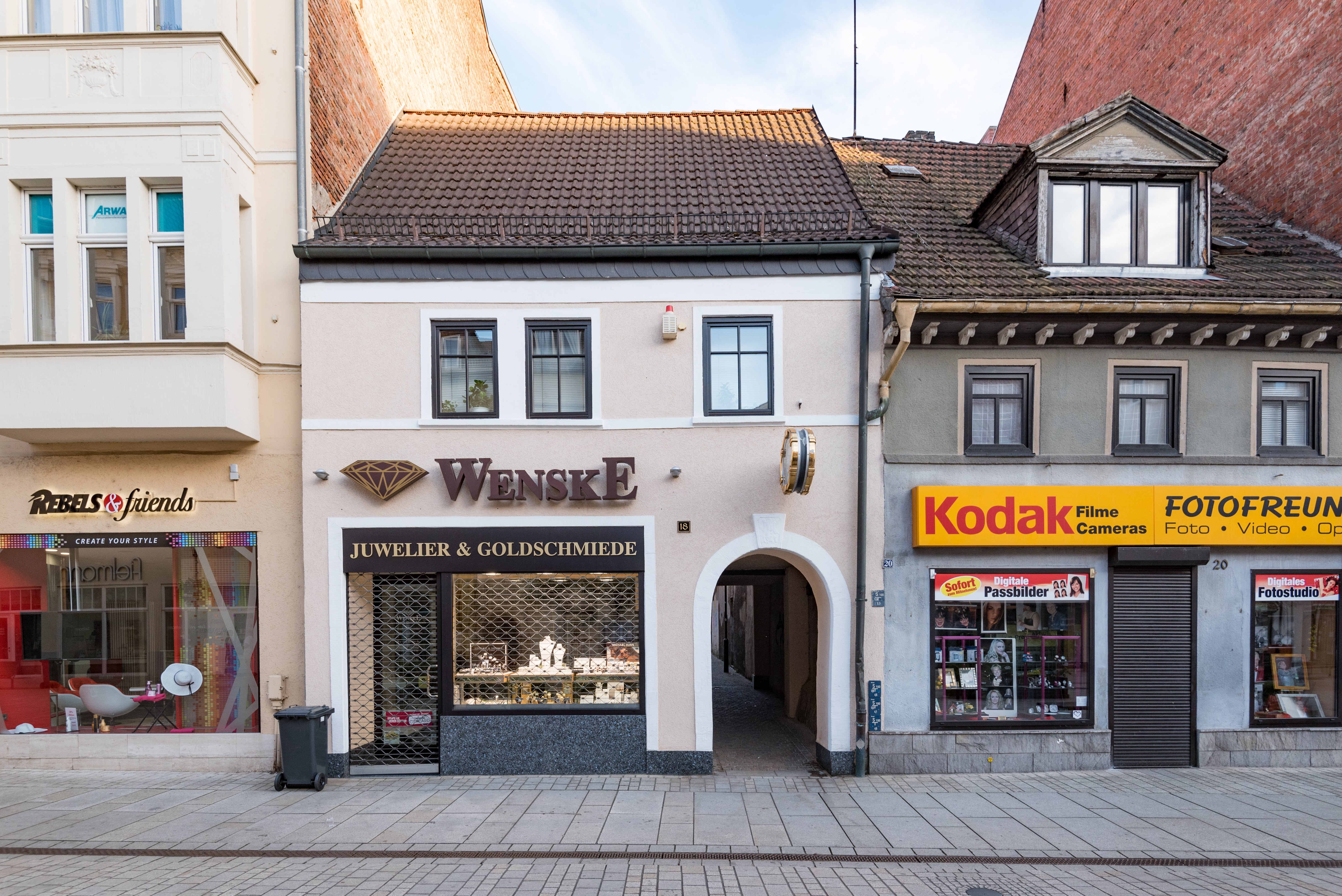 Weißenfels, Jüdenstraße 18